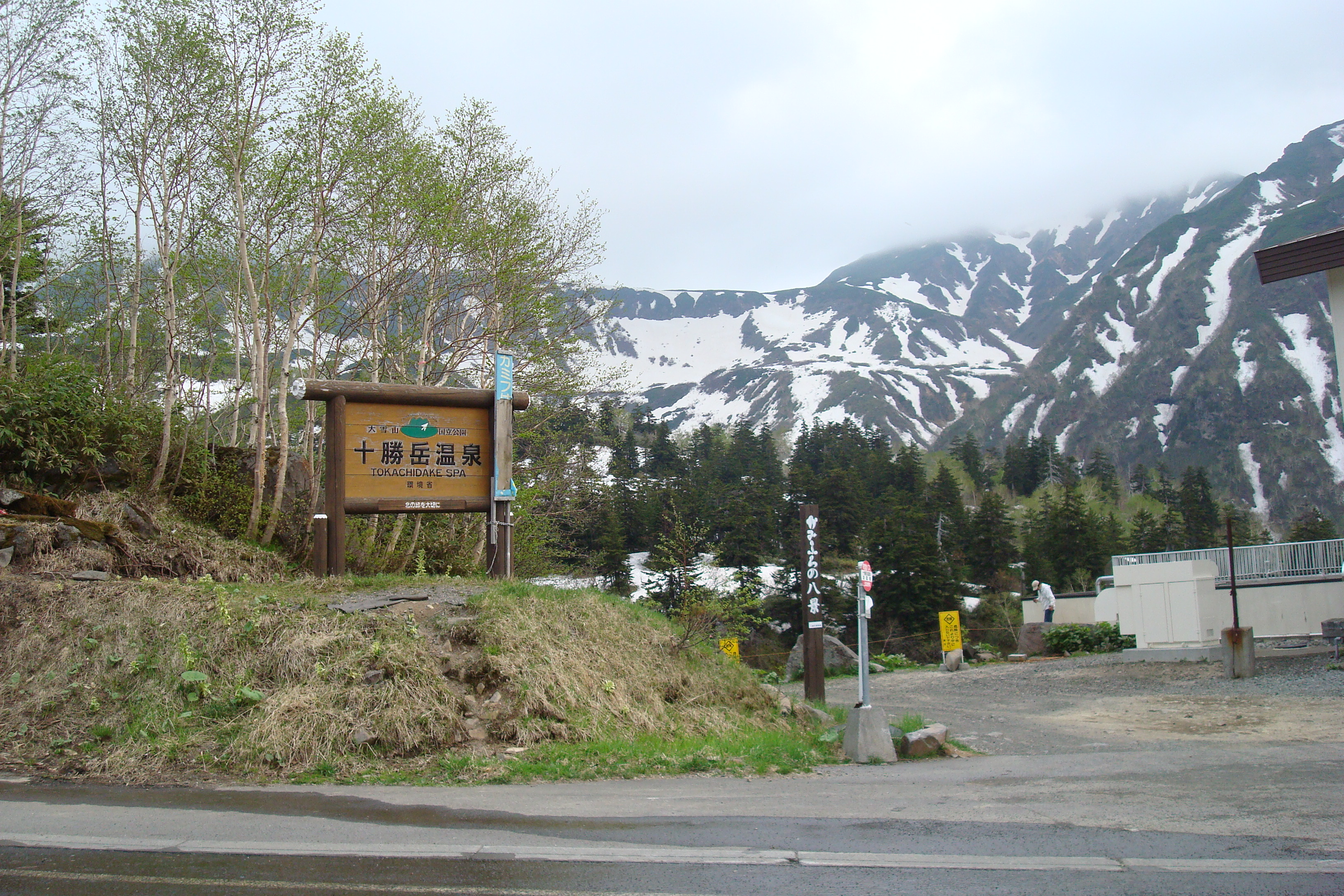 Tokachidake Onsen in Kamifurano, Hokkaido, Japan.